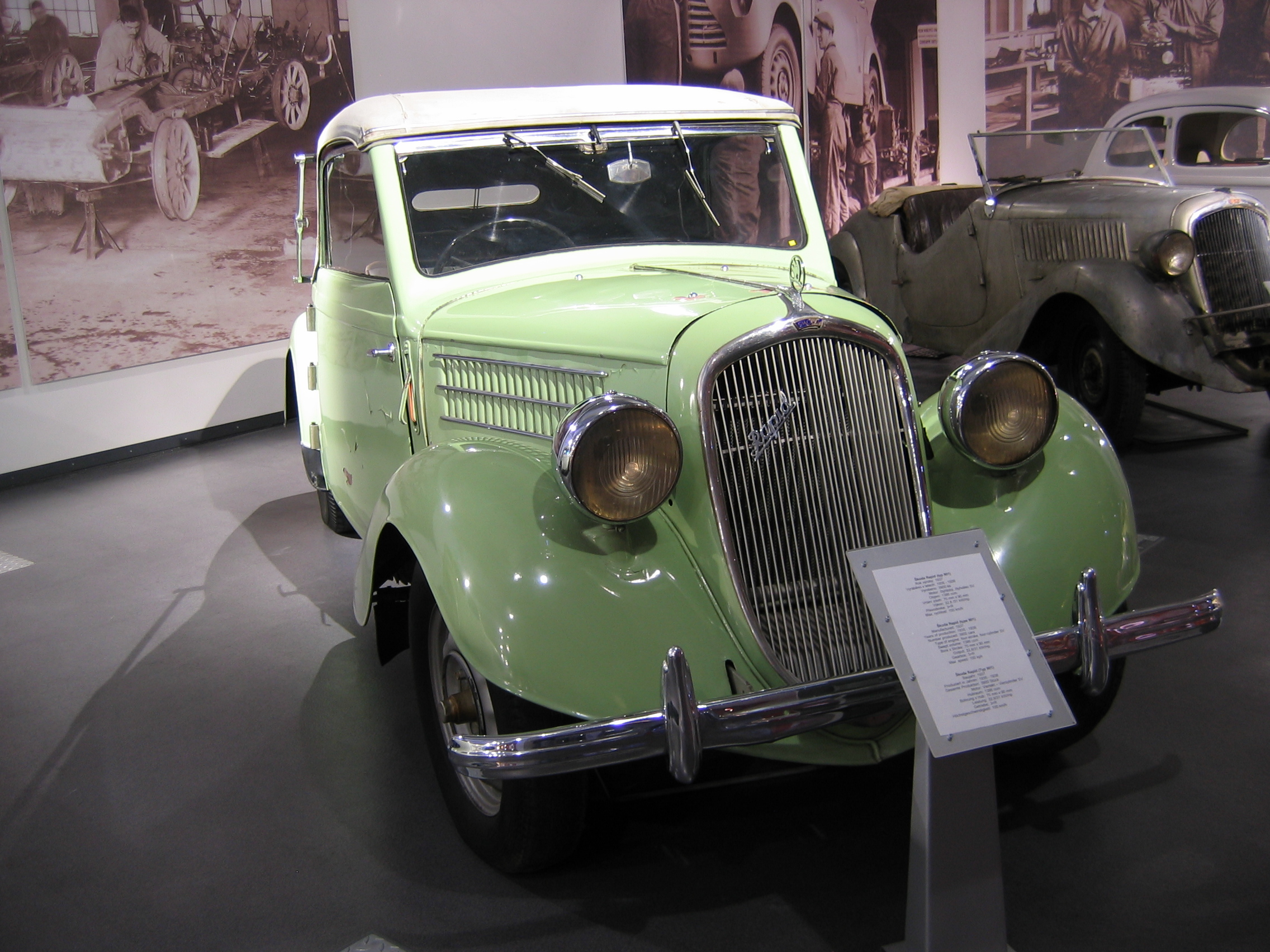 Škoda Rapid (type 901) - Škoda Auto Museum, Mlada Boleslav